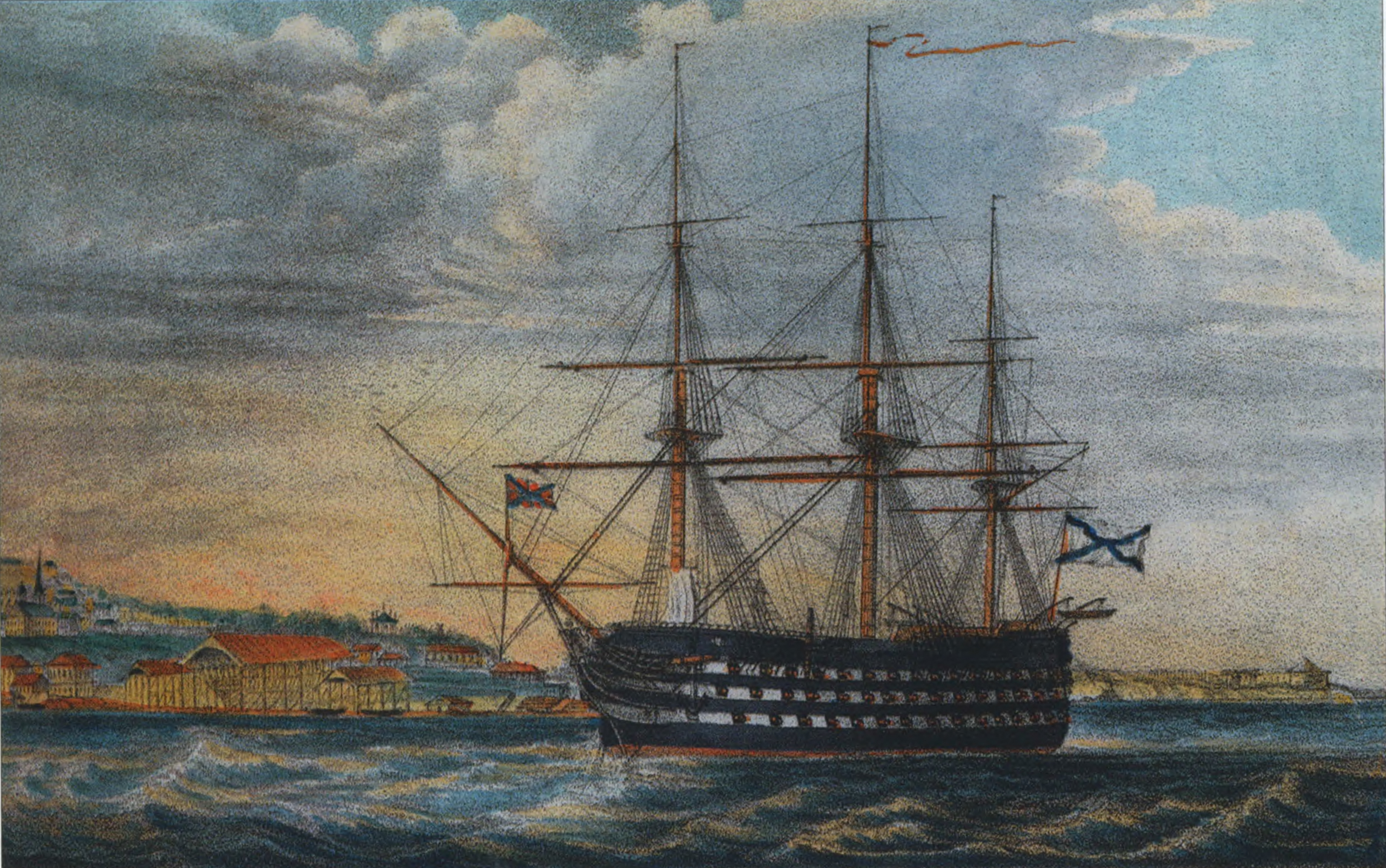 Линейный корабль Три Святителя. Литография Подустова по рисунку В. А. Прохорова